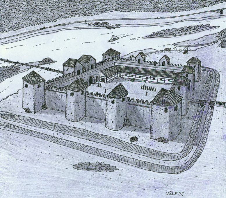 Rekonstruktionsversuch des spätantiken Kastells Contra Aquincum/Budapest (HU), 3.-4. Jahrhundert n.Chr.